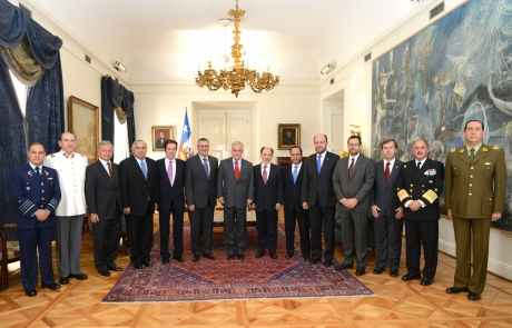 Sebastián Piñera encabeza reunión del Consejo de Seguridad Nacional (COSENA).